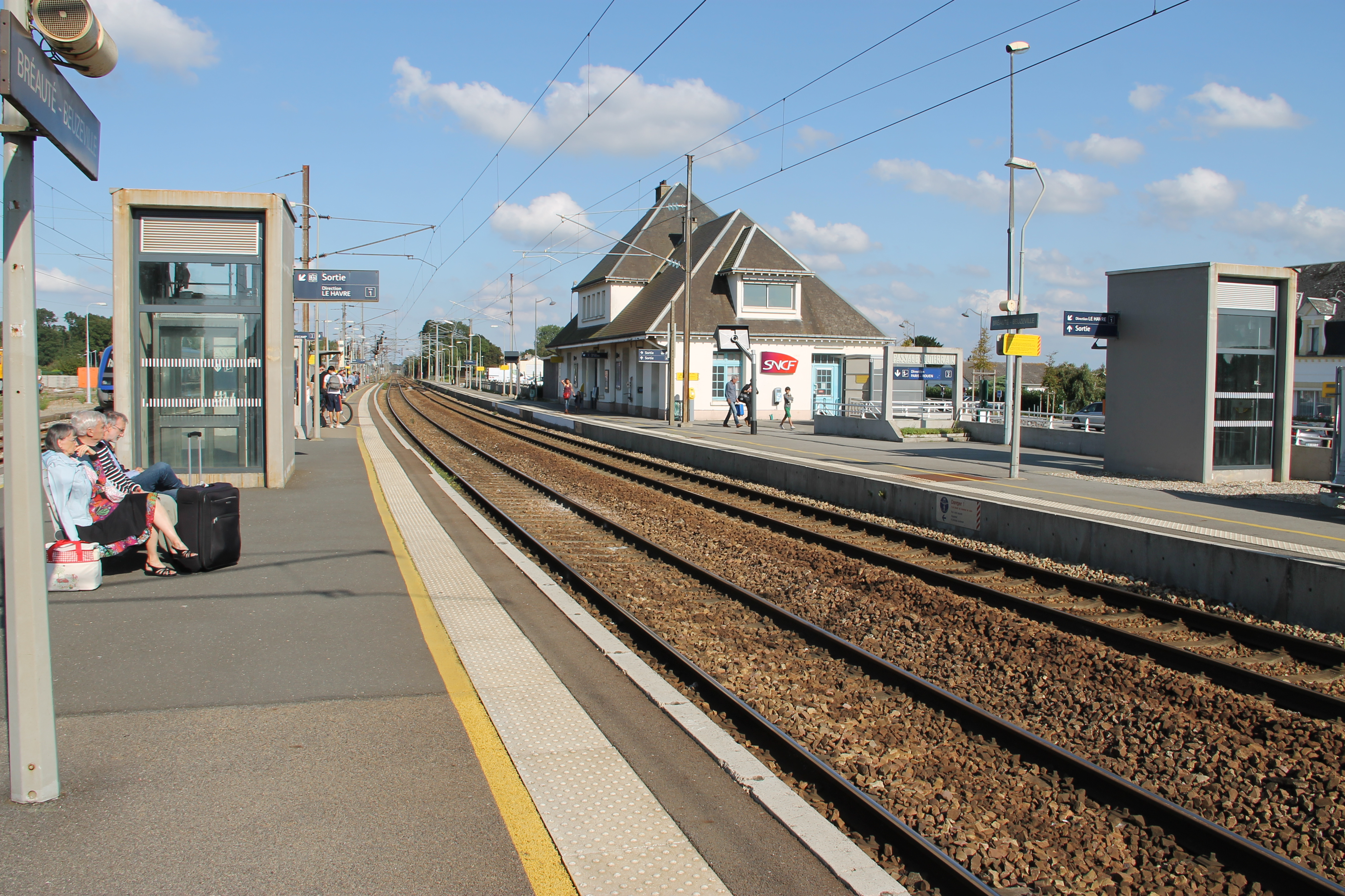 Vue des quais de la gare de Bréauté - Beuzeville, département de la Seine-Maritime, France, en direction de Rouen.